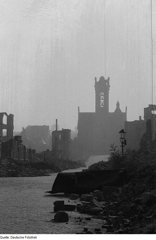 Original image description from the Deutsche FotothekRuine der Lukaskirche mit Ansicht der Andreas-Schubert-Straße